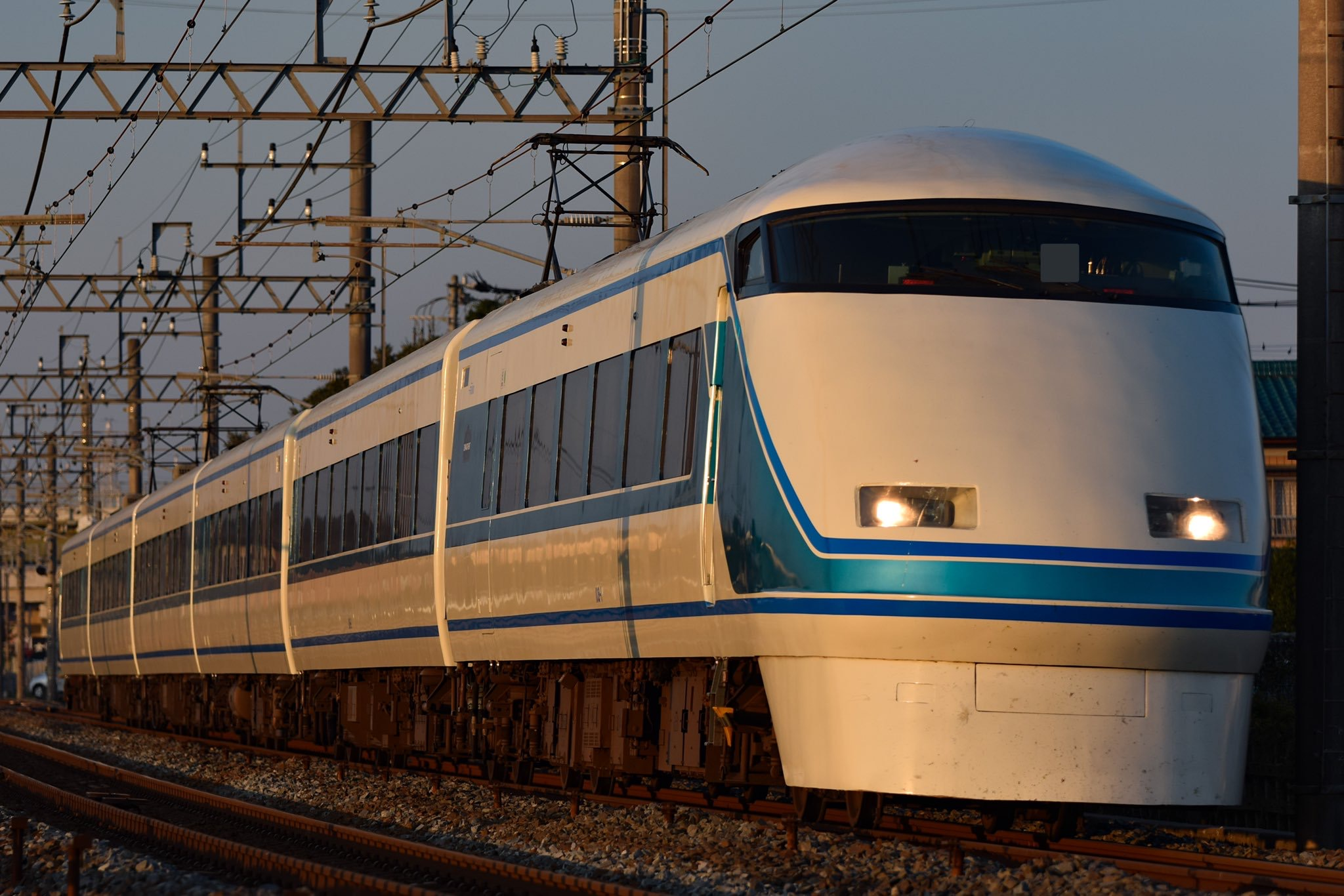 東武100系108編成_(粋スペーシア)